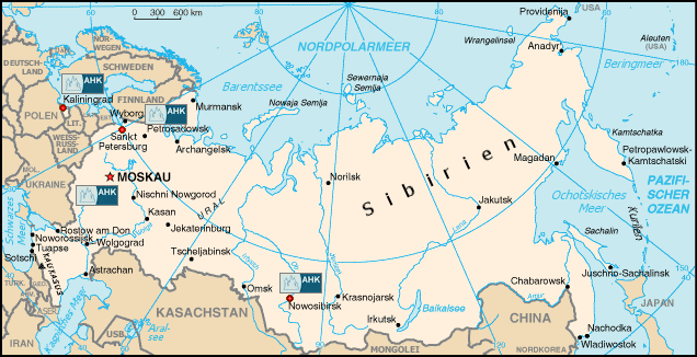 Außenstellen der AHK Moskau / Die ursprüngliche Grafik wurde um die AHK Logos erweitert